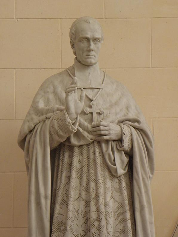 Statue du cardinal Brossay-Saint-Marc par Valentin (1880)), en l'église Notre-Dame de Bourg-des-Comptes.